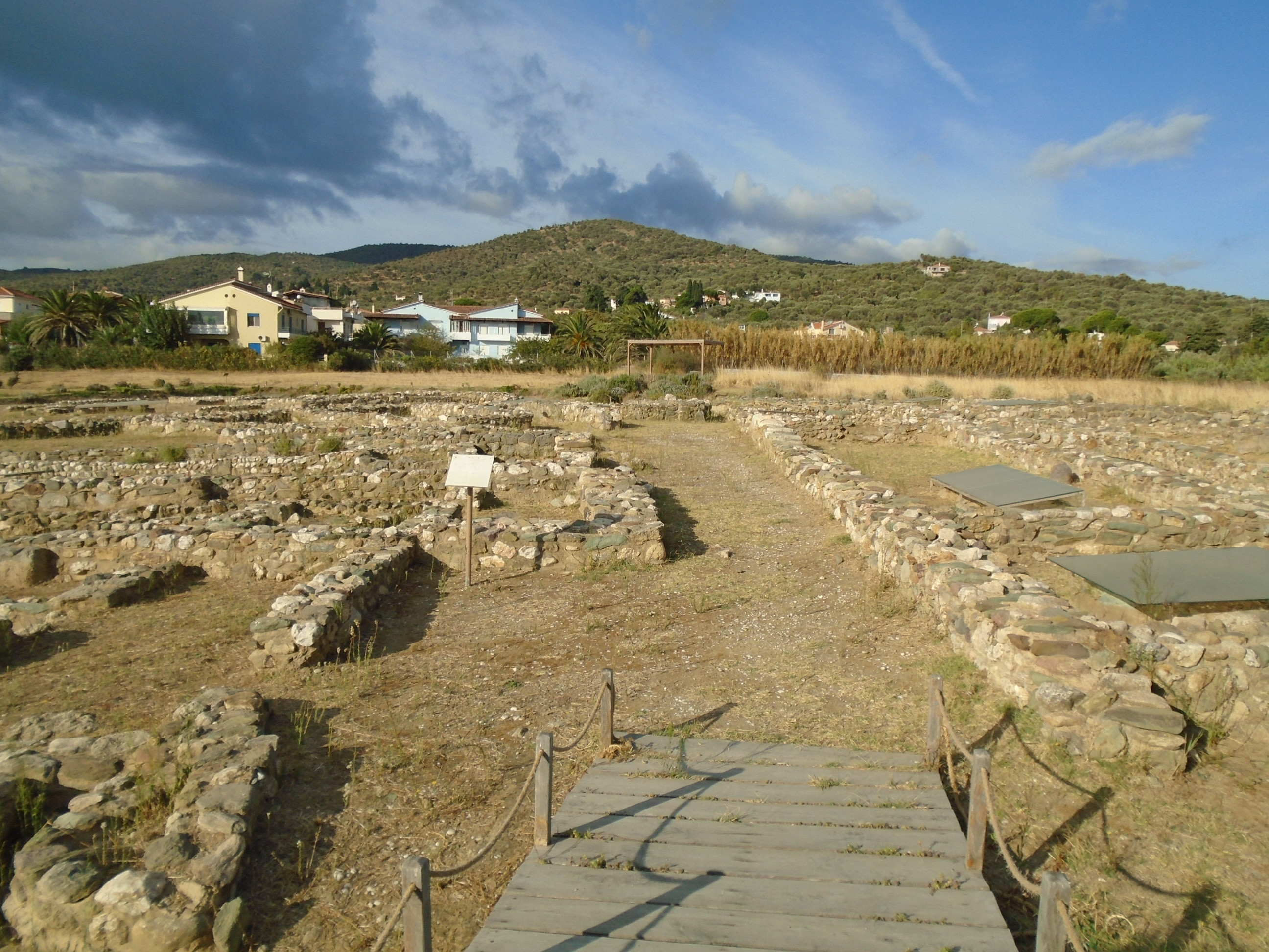 Αρχαιολογικός Χώρος Θερμής«Αρχαιολογικός Χώρος Θερμής»